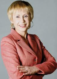 Pronosticadora del clima en "Nadia 630"